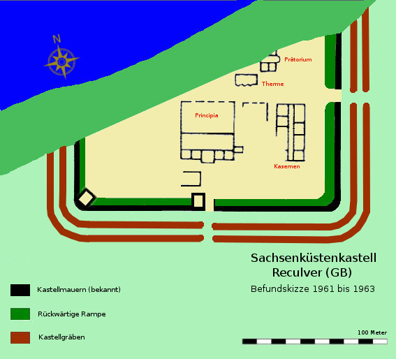 Skizze des Sachsenküstenkastells Reculver (GB)